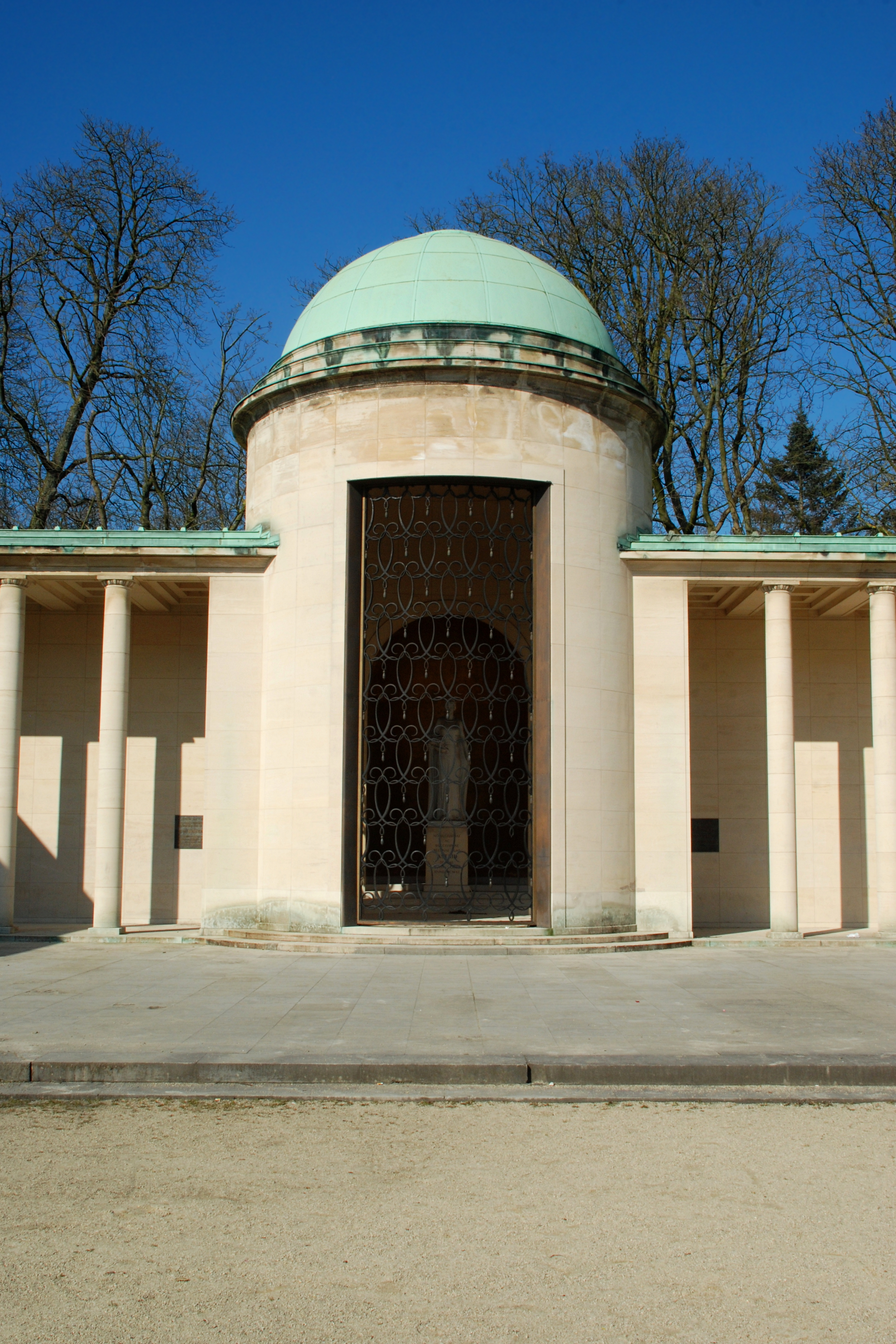 Belgique - Bruxelles - Mémorial Reine Astrid (Architecture monumentale - architecte Paul Bonduelle - 1938)